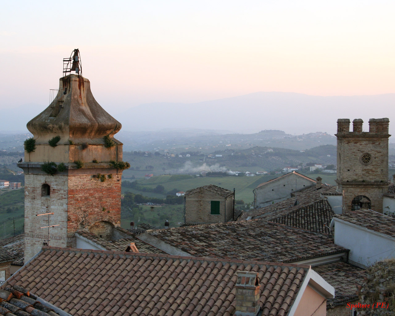 Spoltore vista dal castello , Italy